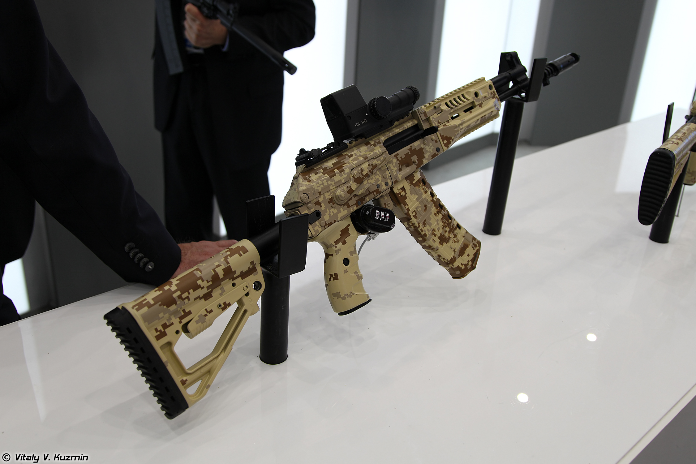 5,45х39 автомат АК-12 6П70